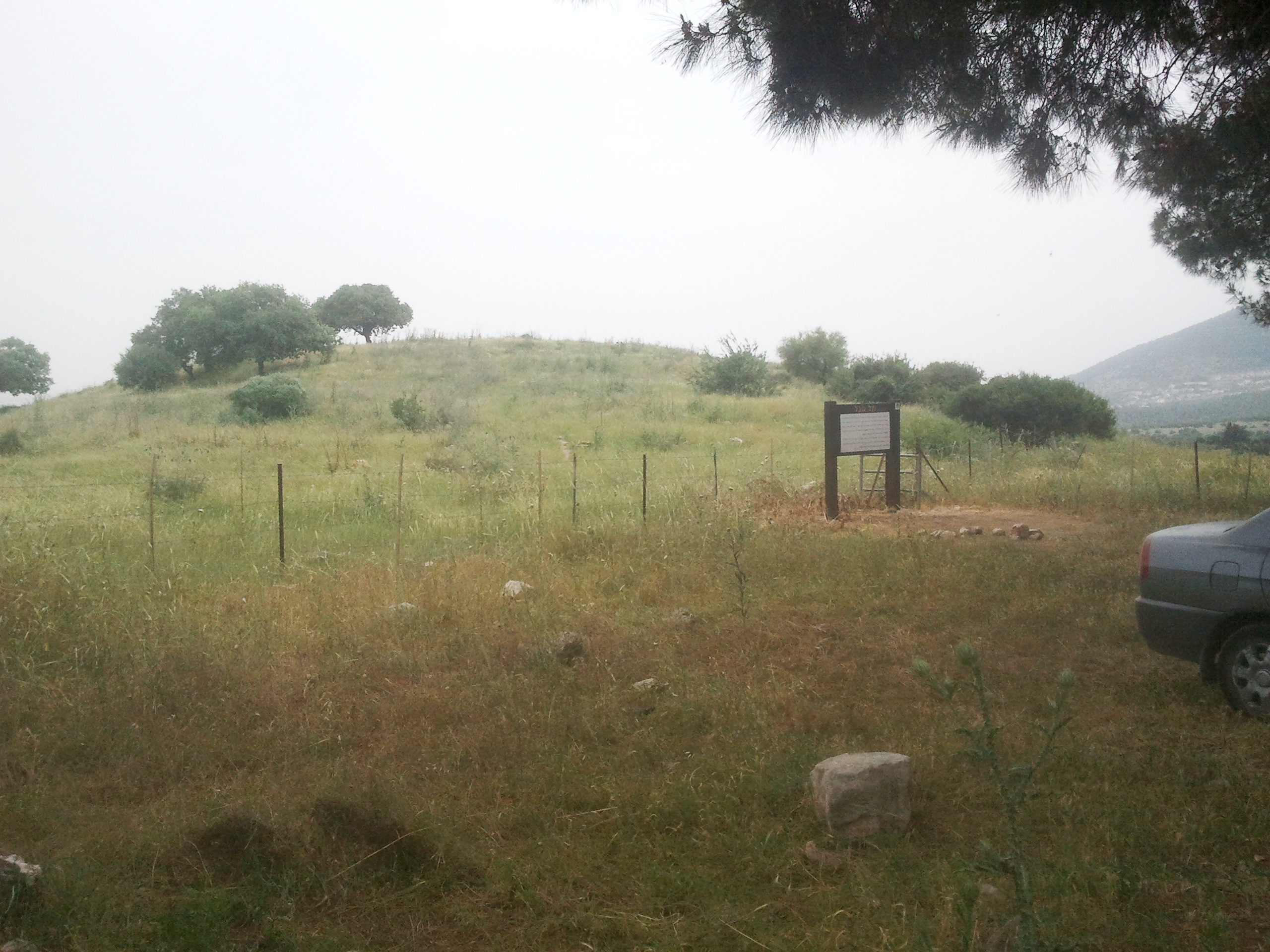 תל גובל מזוהה עם היישוב המקראי "אזנות תבור" המוזכר בספר יהושע